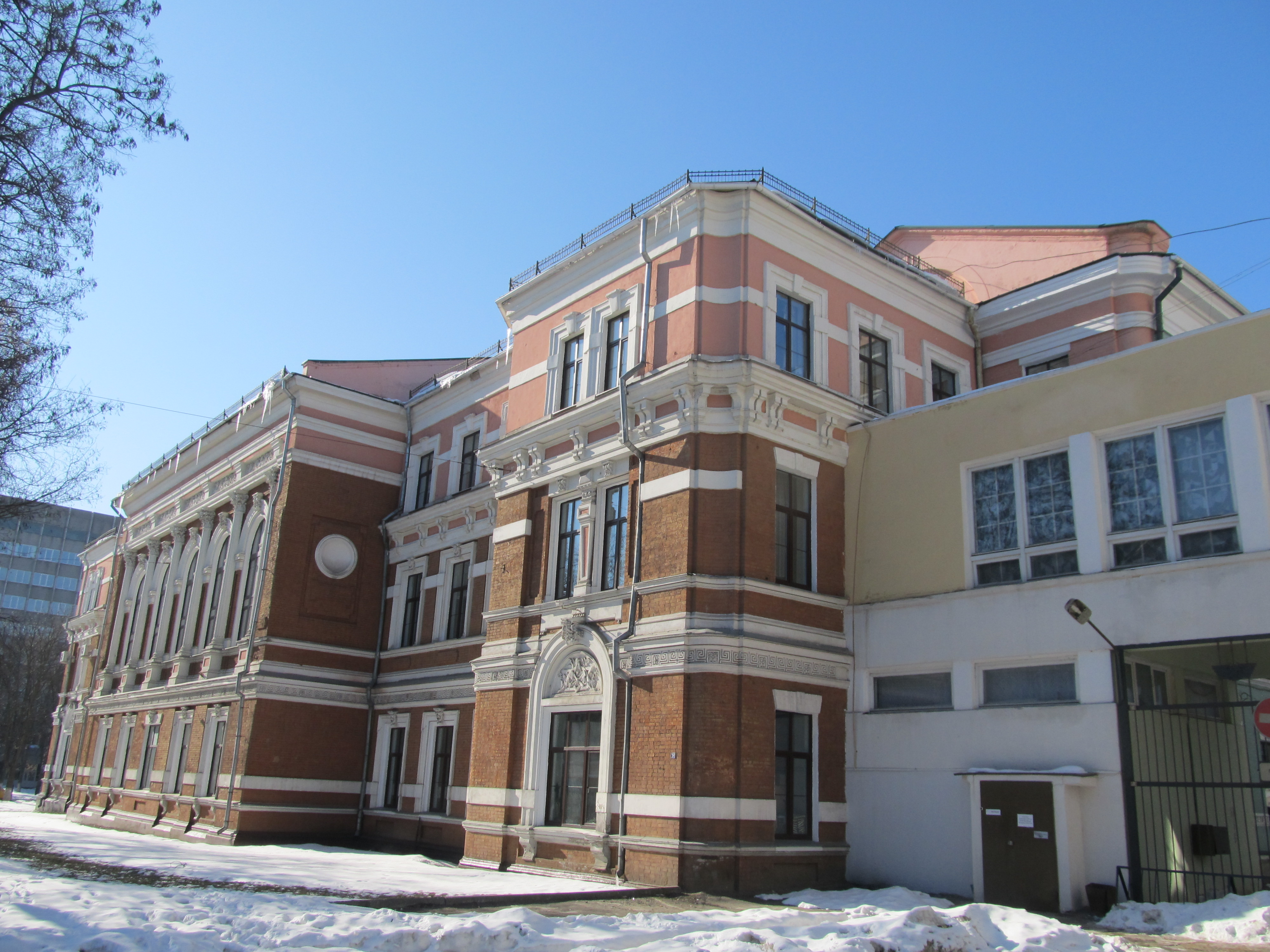 Беларуская (тарашкевіца): Будынак былой мужчынскай гімназіі. г. Гомель This is a photo of Belarusian heritage monument. Reference number: 312Г000039 ( WLM)